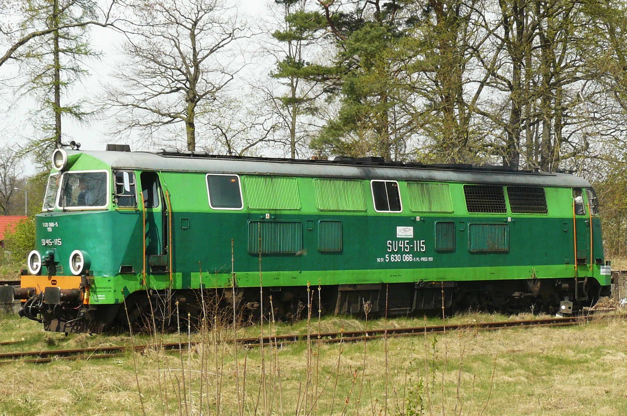 SU45-115 z pociągiem specjalnym "Dolnośląskie Zakamarki" (25.4.2015r.). Osiecznica Kliczków. Manewry.